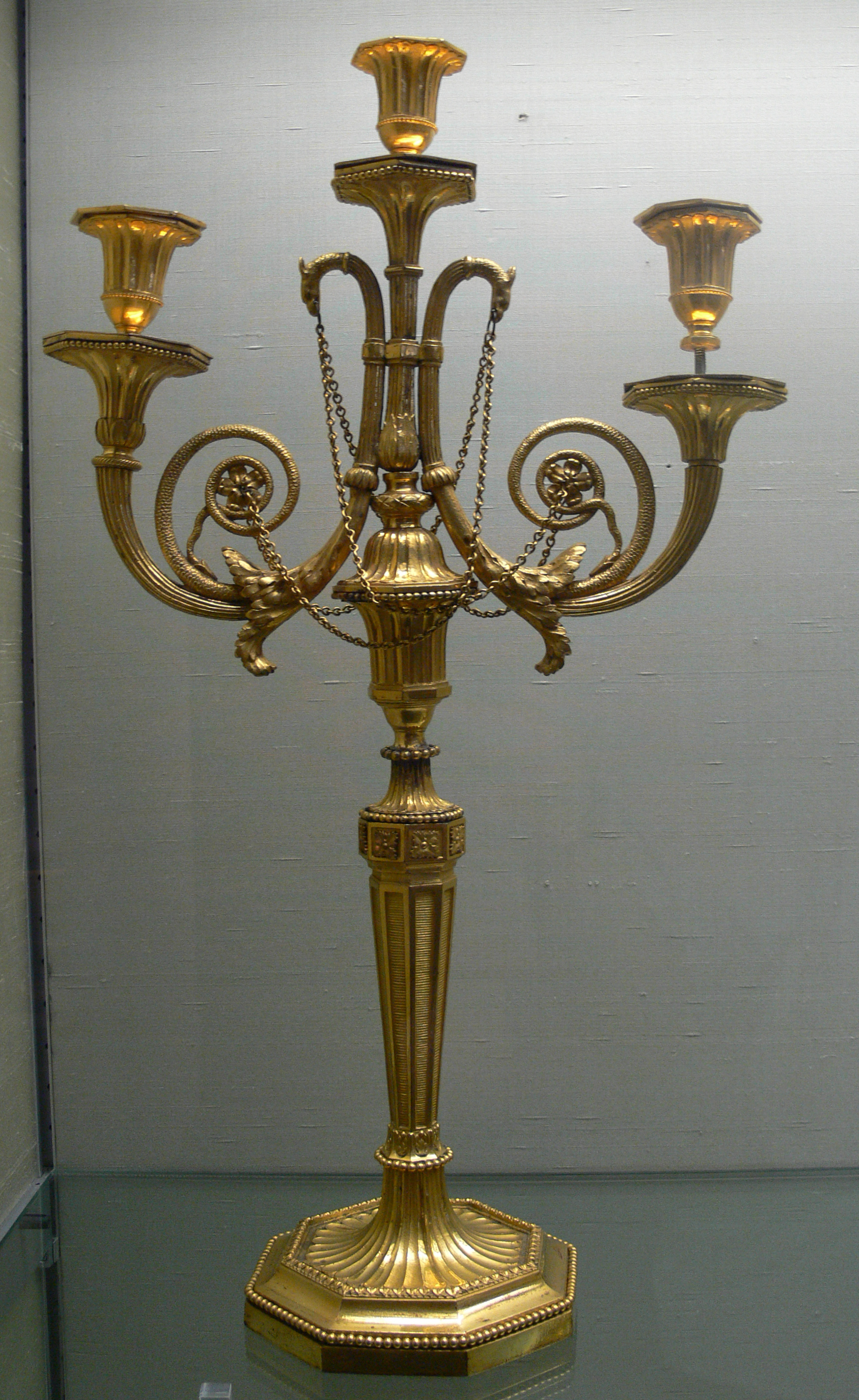 Kandelaber mit Arkanthusranken, Paris (?) um 1790; Bronze vergoldet Kunstgewerbemuseum Berlin, Inv. Nr. 43,73 (Paar)